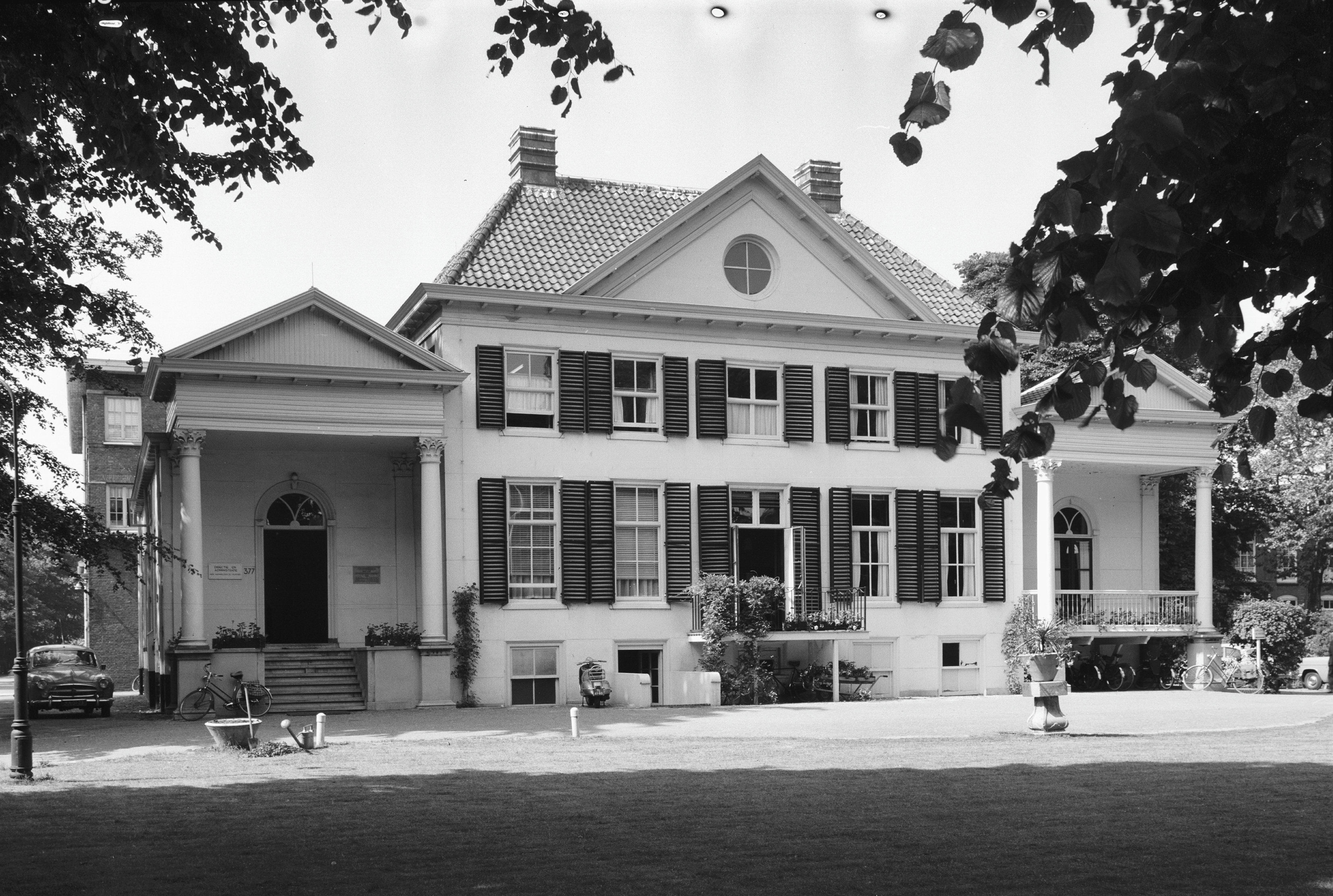 Rozenburg